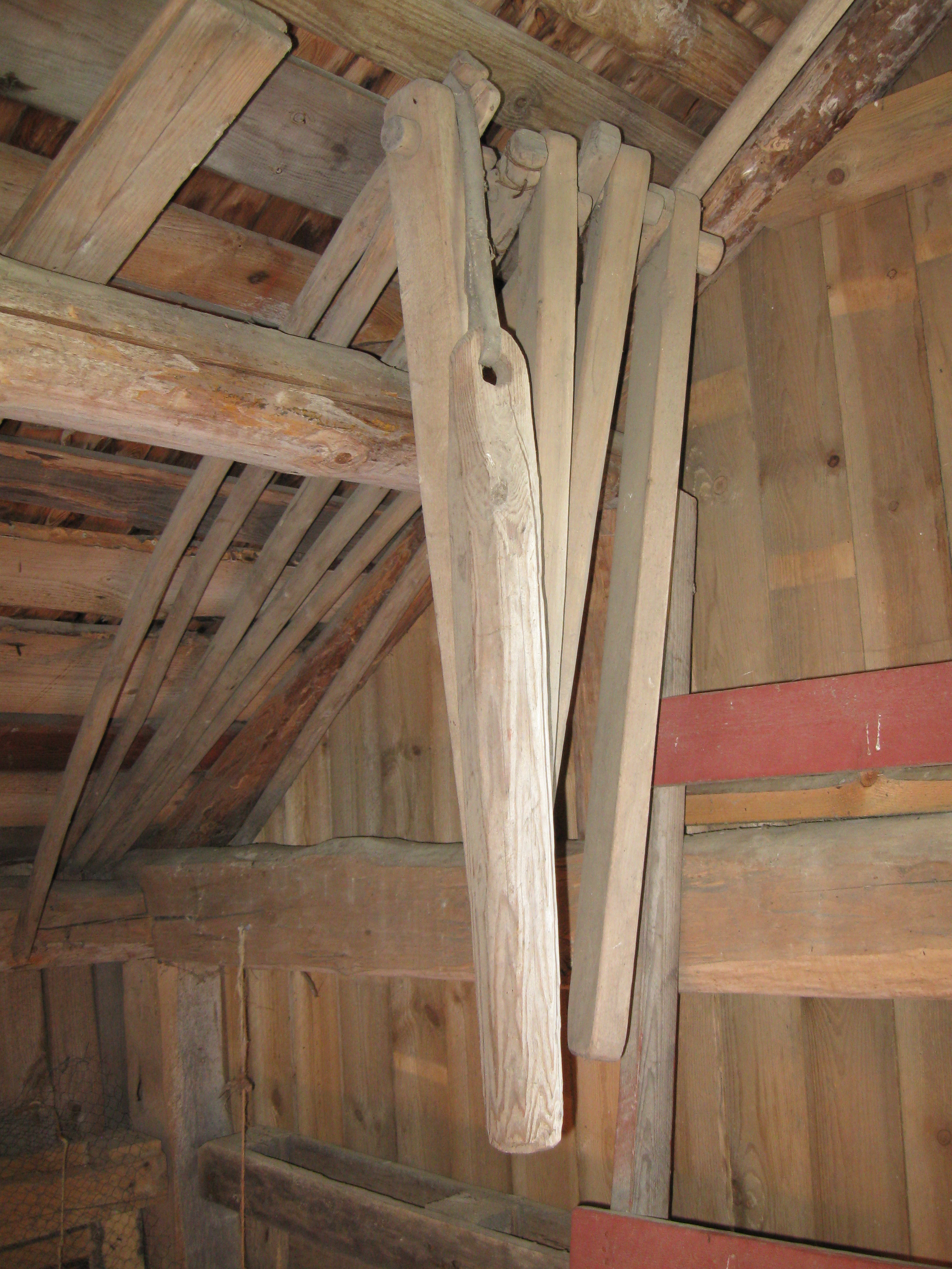 Puintiin käytettyjä varstoja riihen sivurakennuksen kattovasoista roikkumassa.